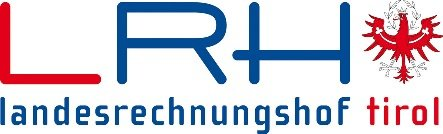 Logo des Landesrechnungshofes Tirol